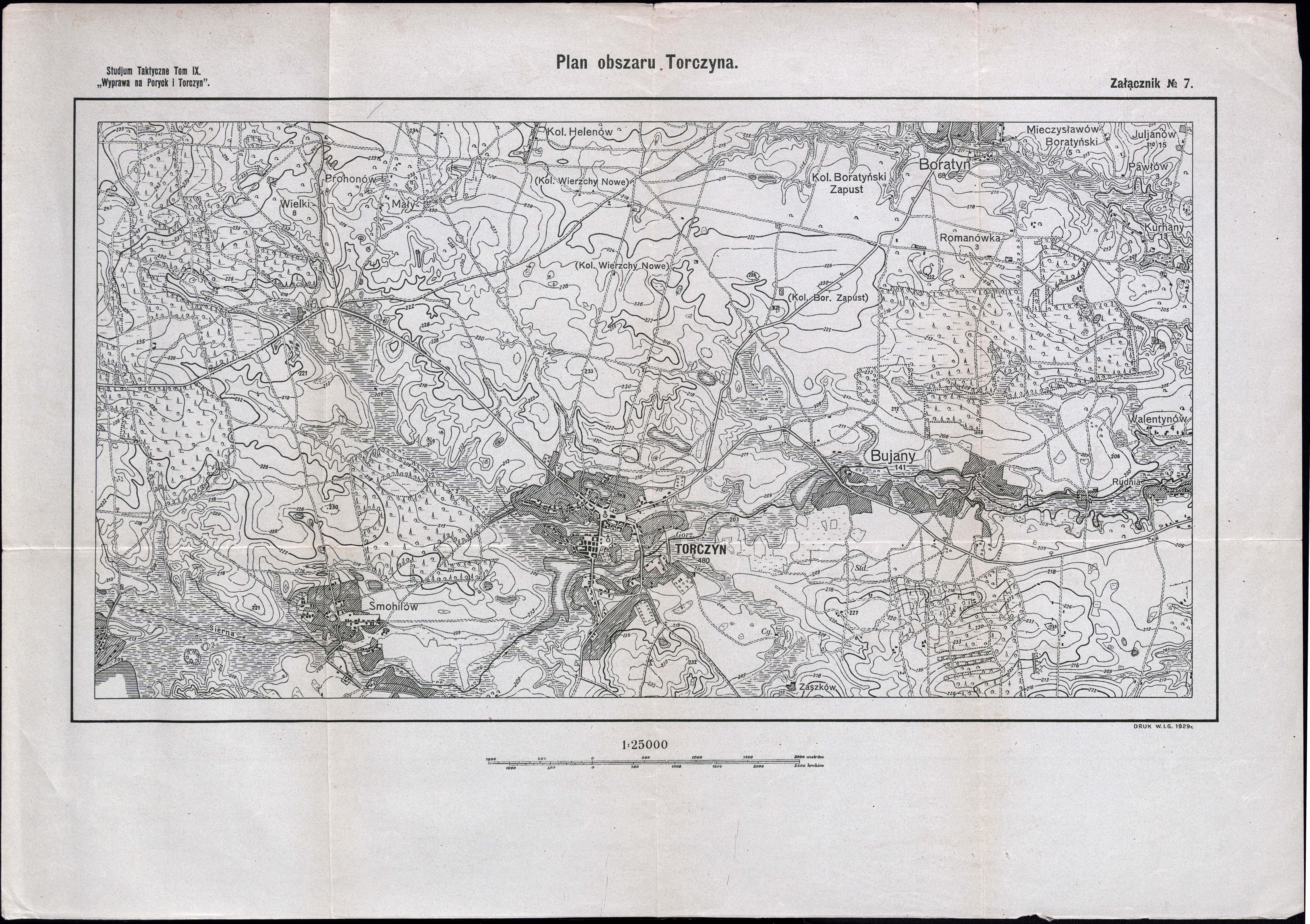 Plan okolic Torczyna z 1929